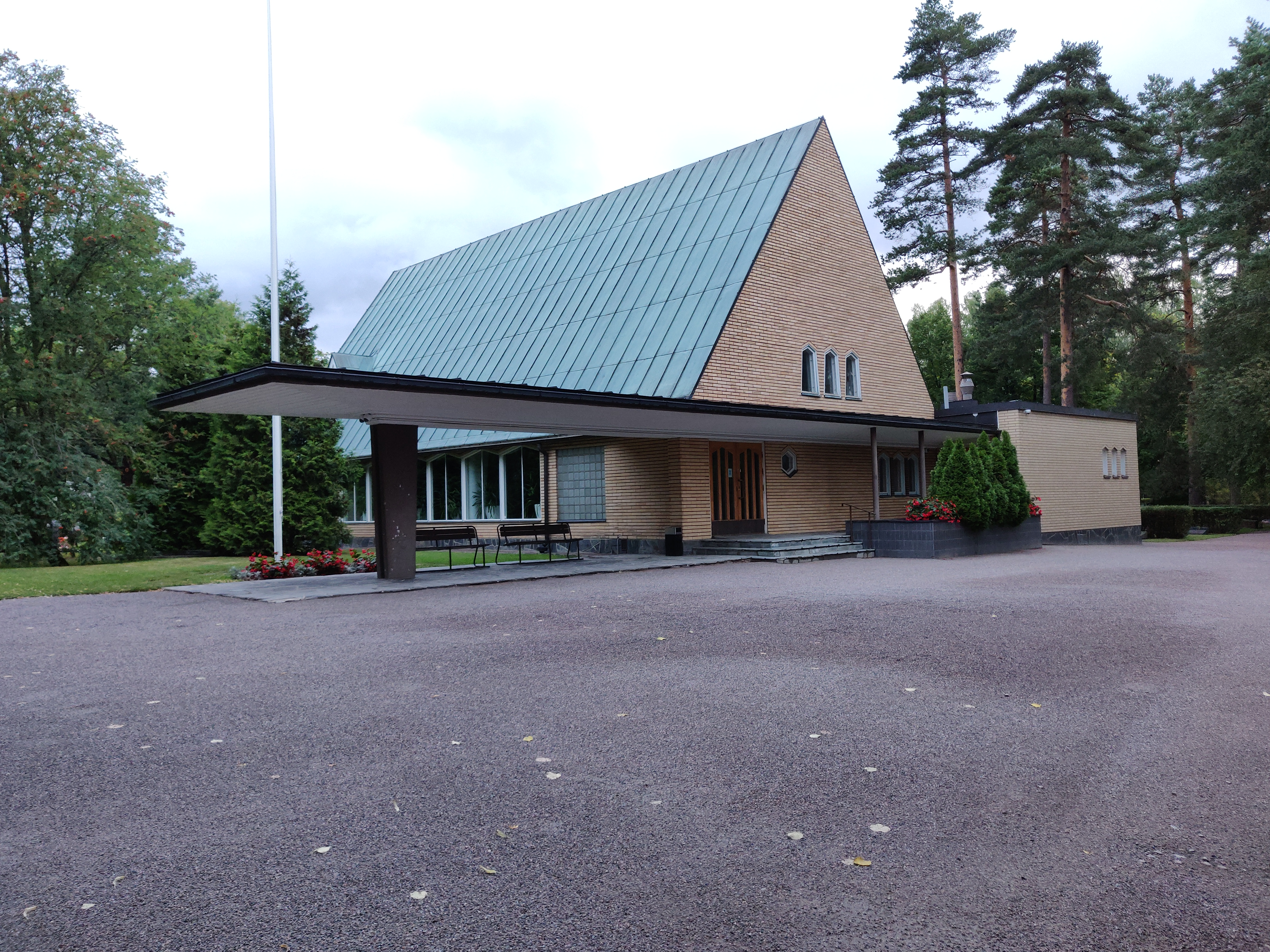 Hyvinkäällä Puolimatkan hautausmaalla sijaitseva siunauskappeli.